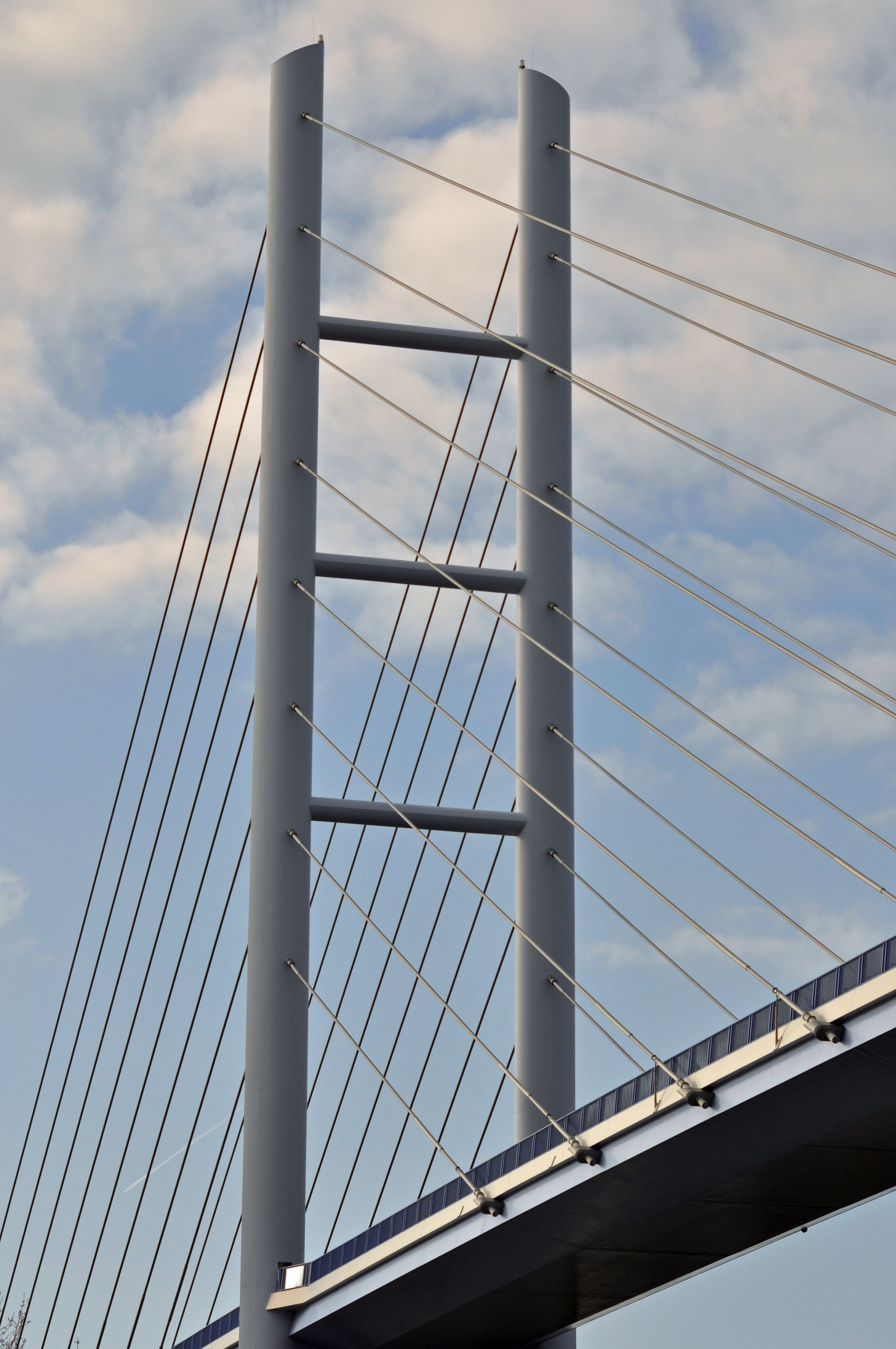 Stralsund, Strelasundquerung, Rügenbrücke, 3 (2012-01-26) by Klugschnacker in Wikipedia Rügenbrücke Stralsund, Pylon